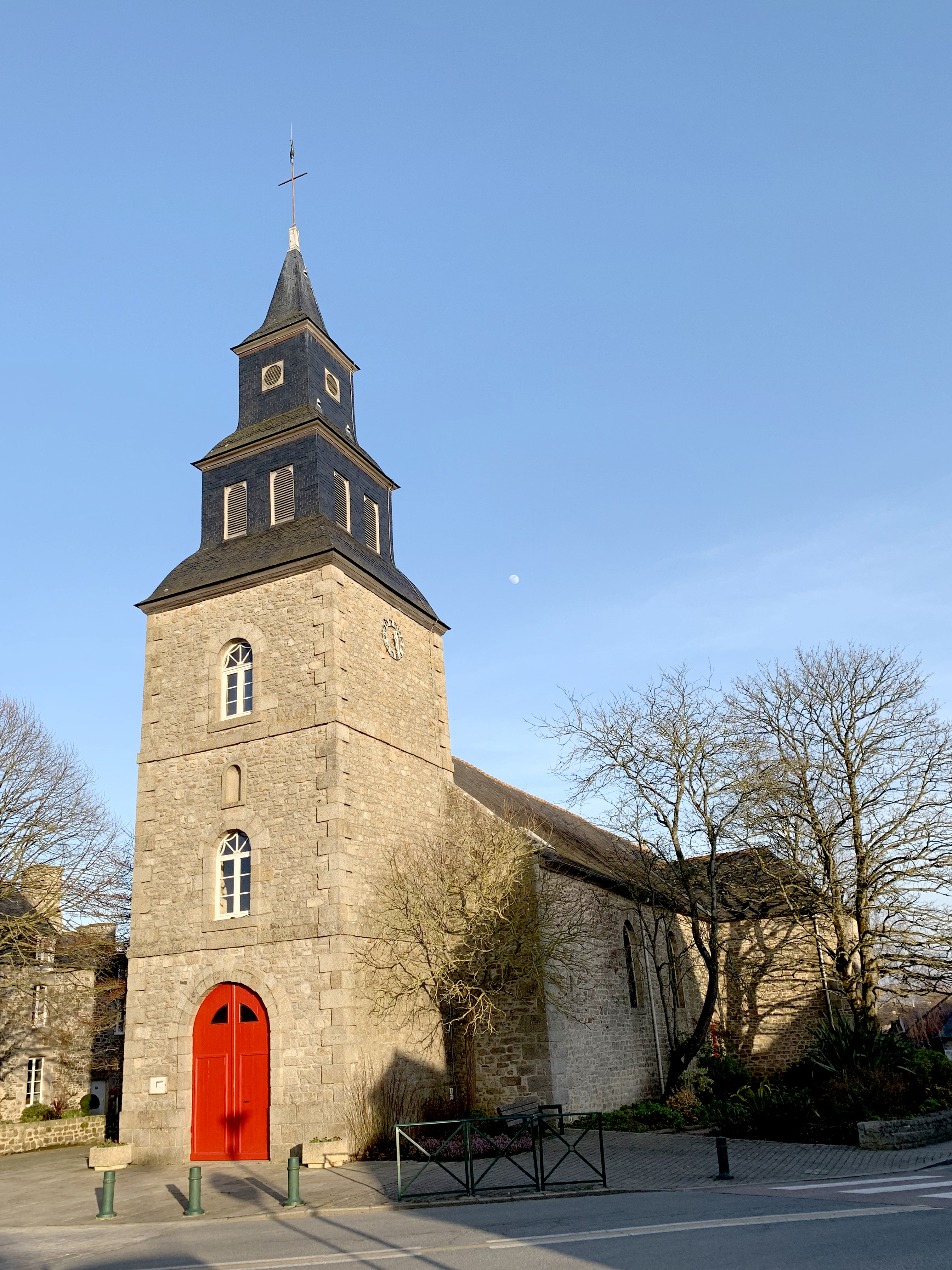 L'église Saint-Laurent de Quévert dans les Côtes d'Armor.